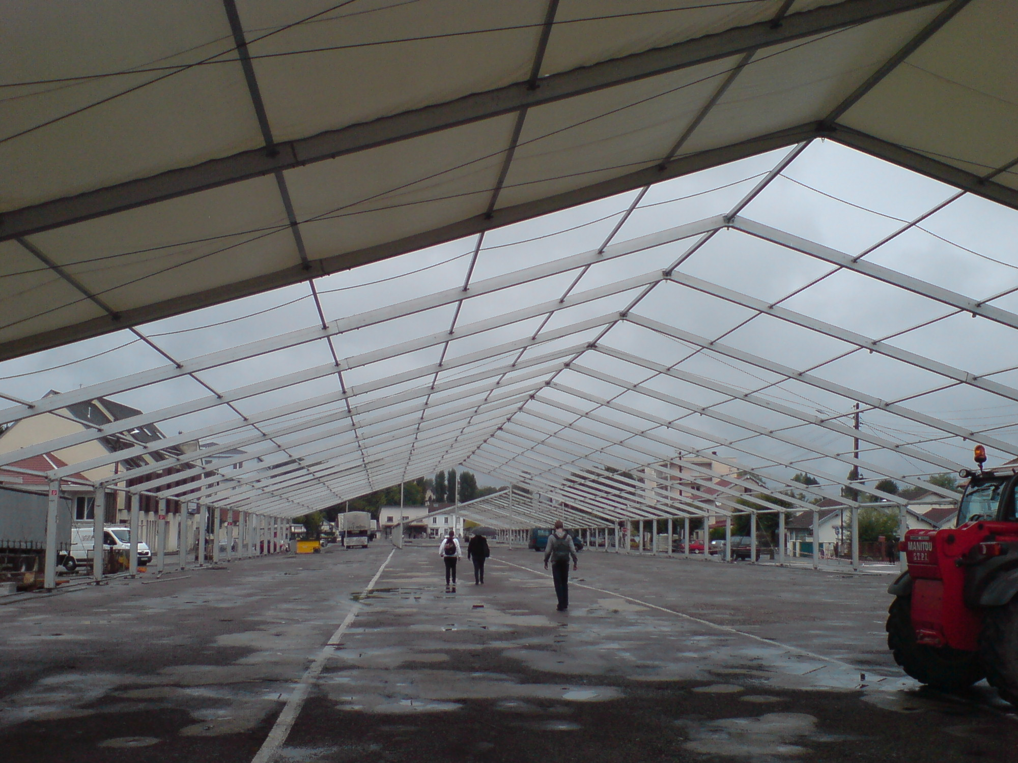 Chapiteau en construction pour accueillir la Foire de Lure